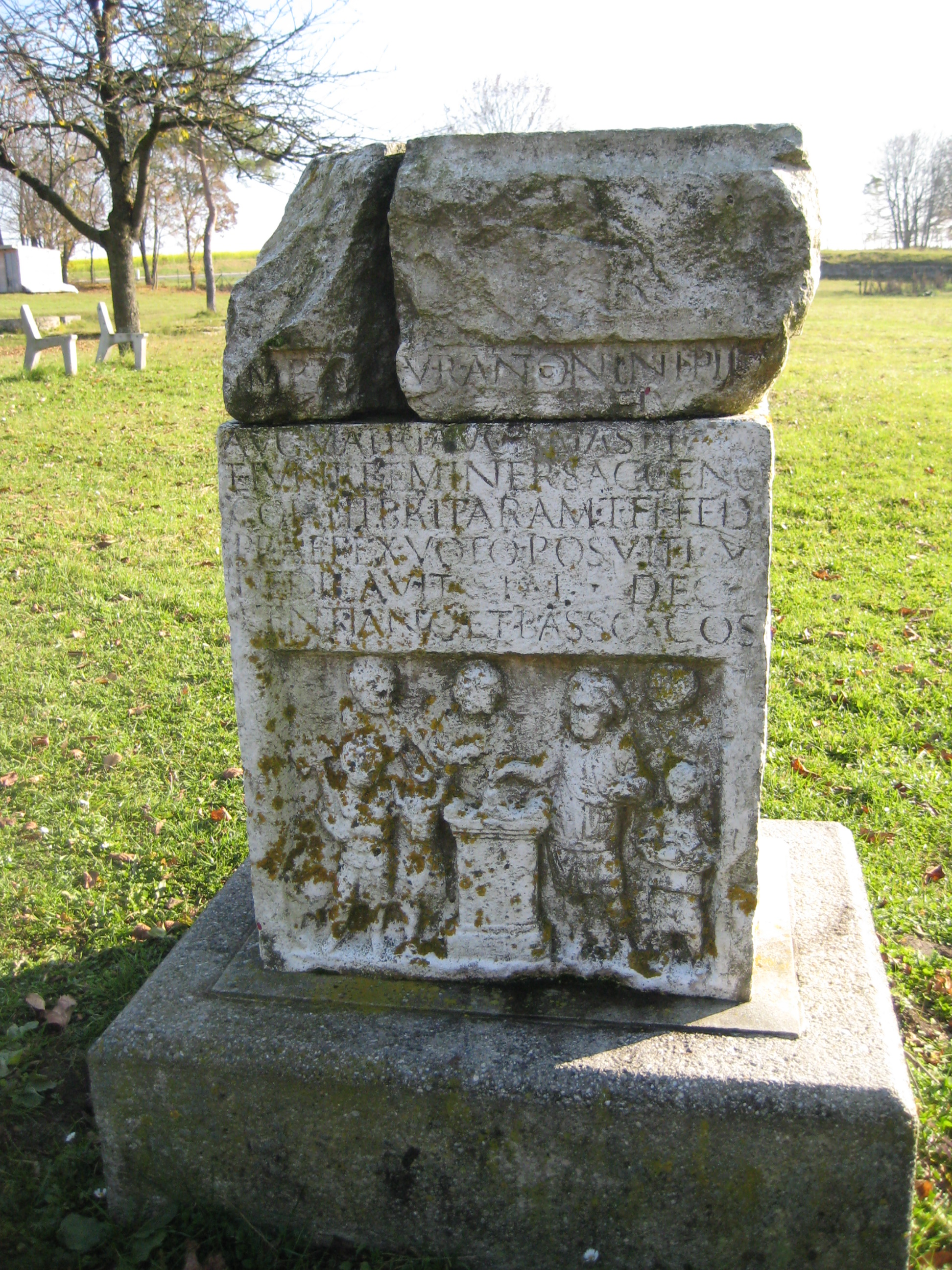 Kastell Eining: Weihestein des Präfekten Titus Flavius Felix, CIL 03, 05935 mit Ergänzung der obersten Zeile, Frontseite: Opferszene (Abguss auf dem Kastellgelände)